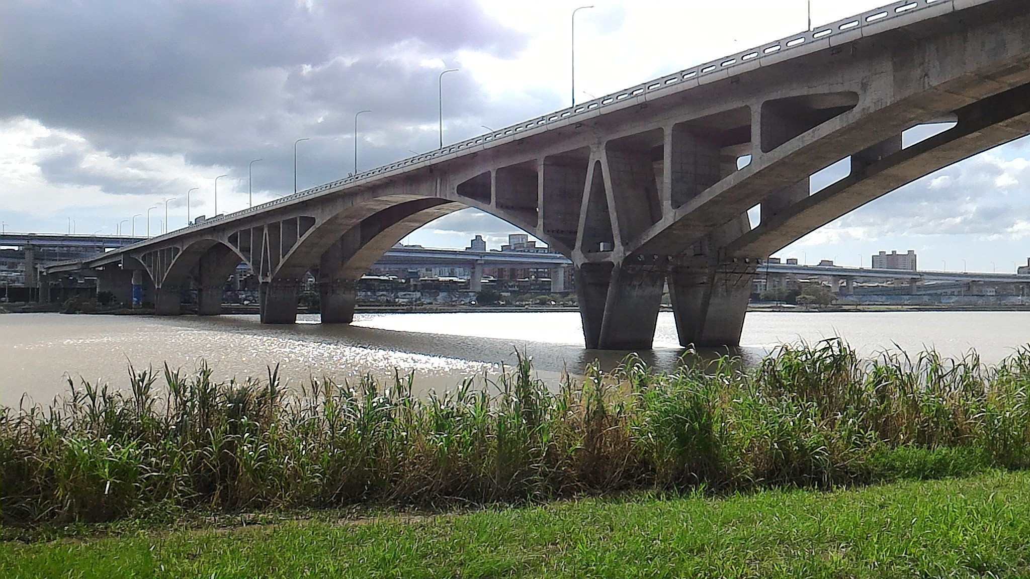 中文（台灣）: 萬板大橋，萬華和板橋之間的橋樑。